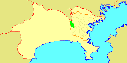 Map of Seya-ku, Yokohama, Kanagawa-prefecture, Japan